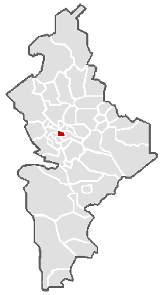 Locator map of the Municipality of Apodaca, in Nuevo León state. Ubicación geográfica del municipio de Apodaca en el estado mexicano de Nuevo León.